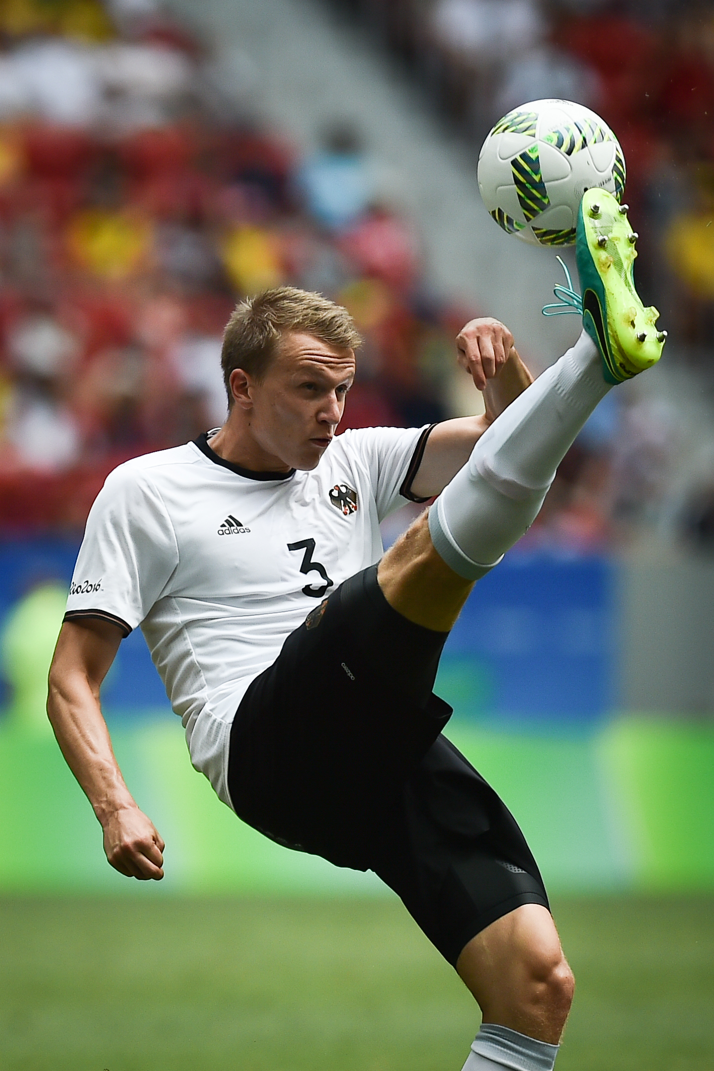 Estádio Nacional de Brasília Mané Garrincha, Brasília, DF, Brasil, 13/8/2016 Foto: Andre Borges/Agência Brasília Portigal e Alemanha jogam neste sábado (12), no Estádio Mané Garrincha, pelas quartas de final do futebol masculino nas Olimpíadas 2016.